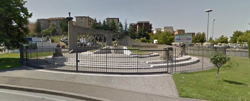 Momunemento ai caduti dell’Aviazione dell'Esercito sito in Viterbo